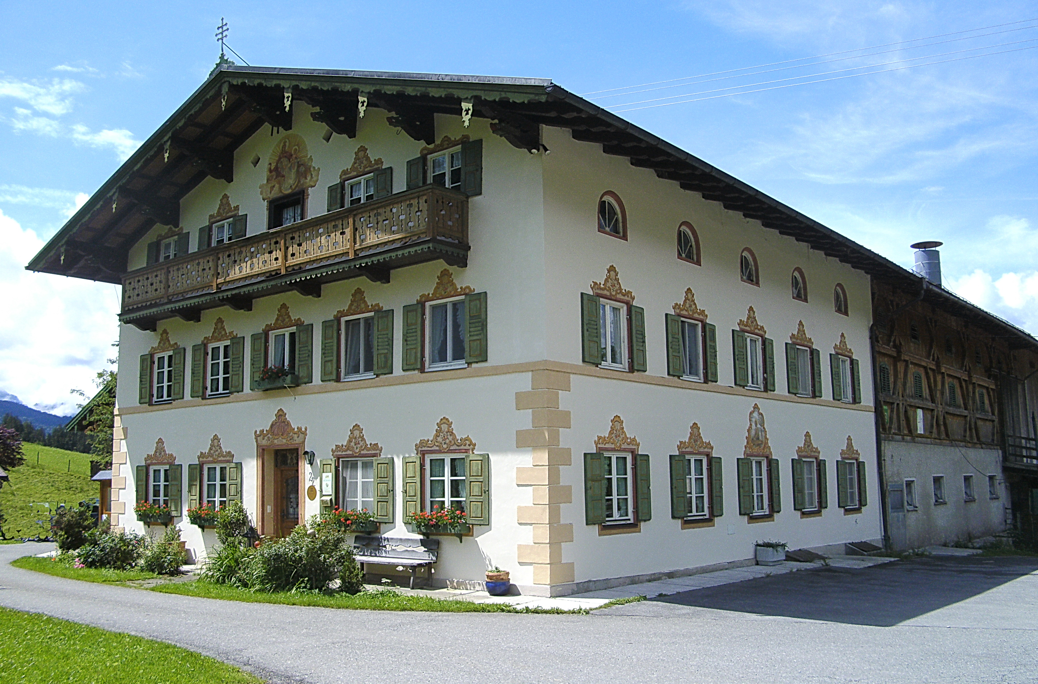 Bauernhof des "Seppenbauer" im Weiler Sachenbach in Jachenau